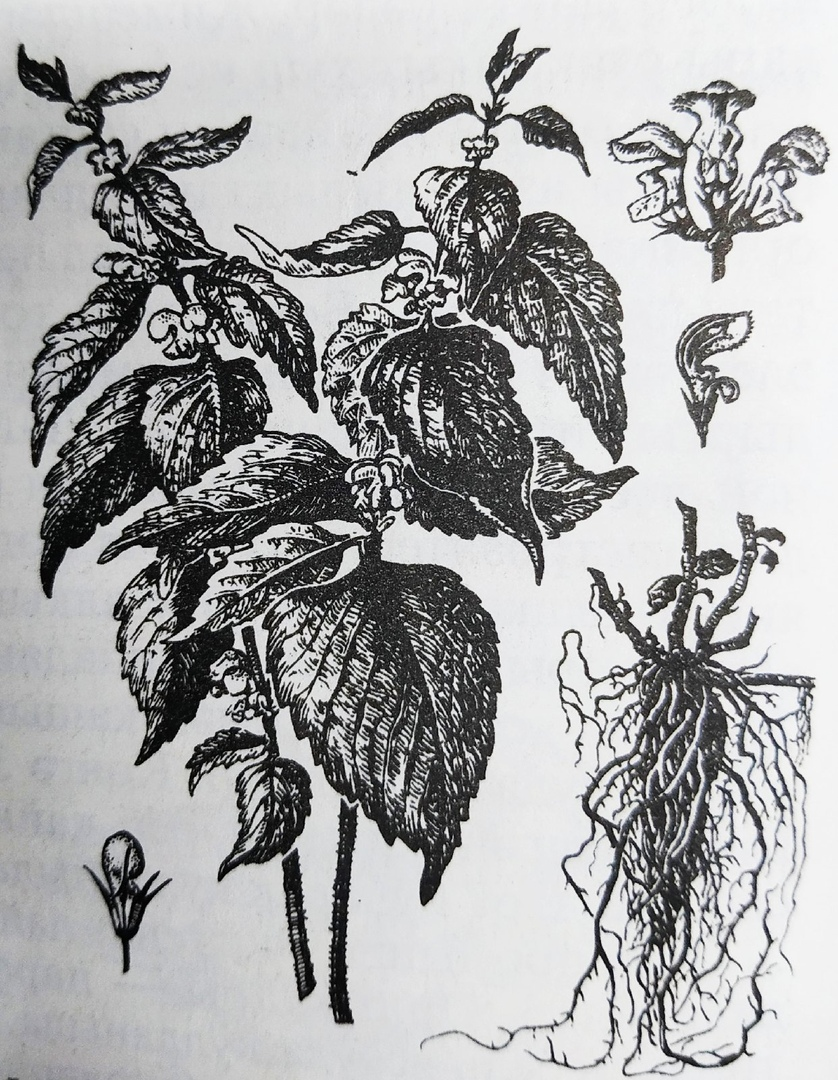 Татарча/tatarça: Үсемлекләр.Ак буллат.2019